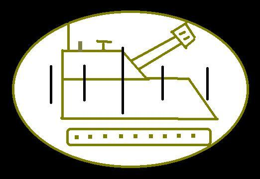 הדגמה לחוק האלפית. אם אורכו של התותח המתנייע 4 מ' והוא משתרע על פני 4 אלפיות, סימן שהוא מצוי במרחק של קילומטר מן הצופה.